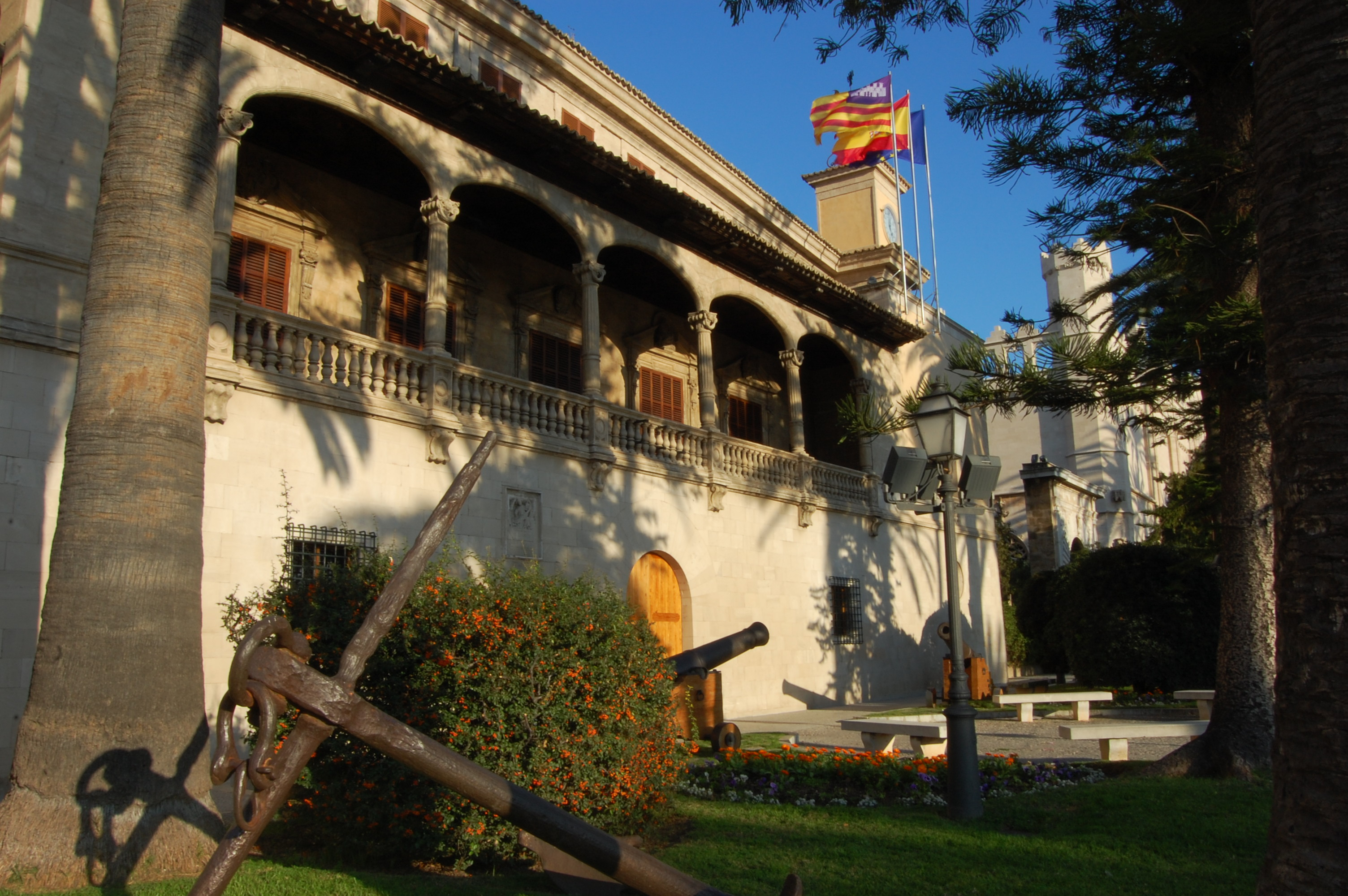 Consolat de Mar (Palma)